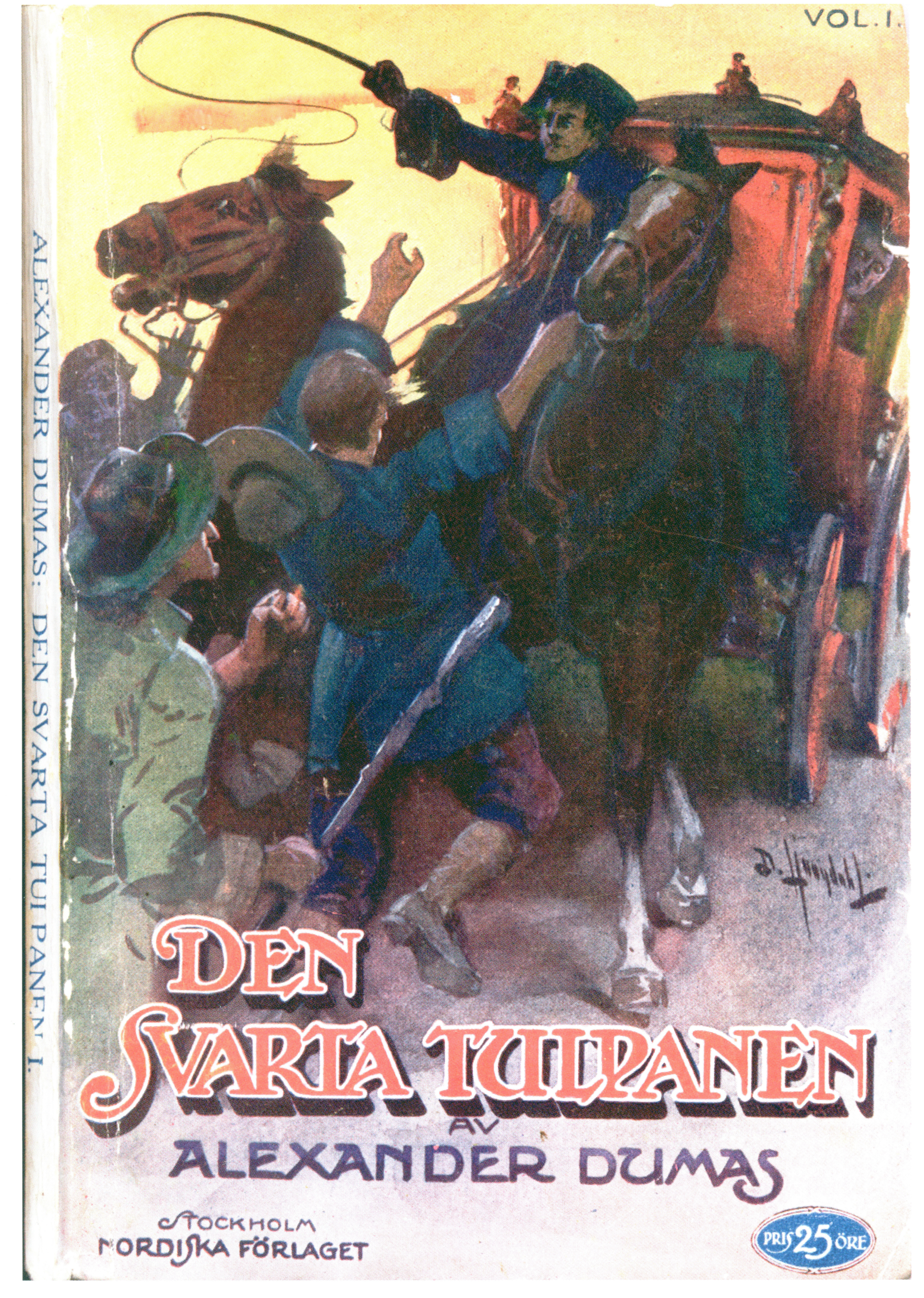 Book cover by David Ljungdahl (1870-1940): Den svarta tulpanen